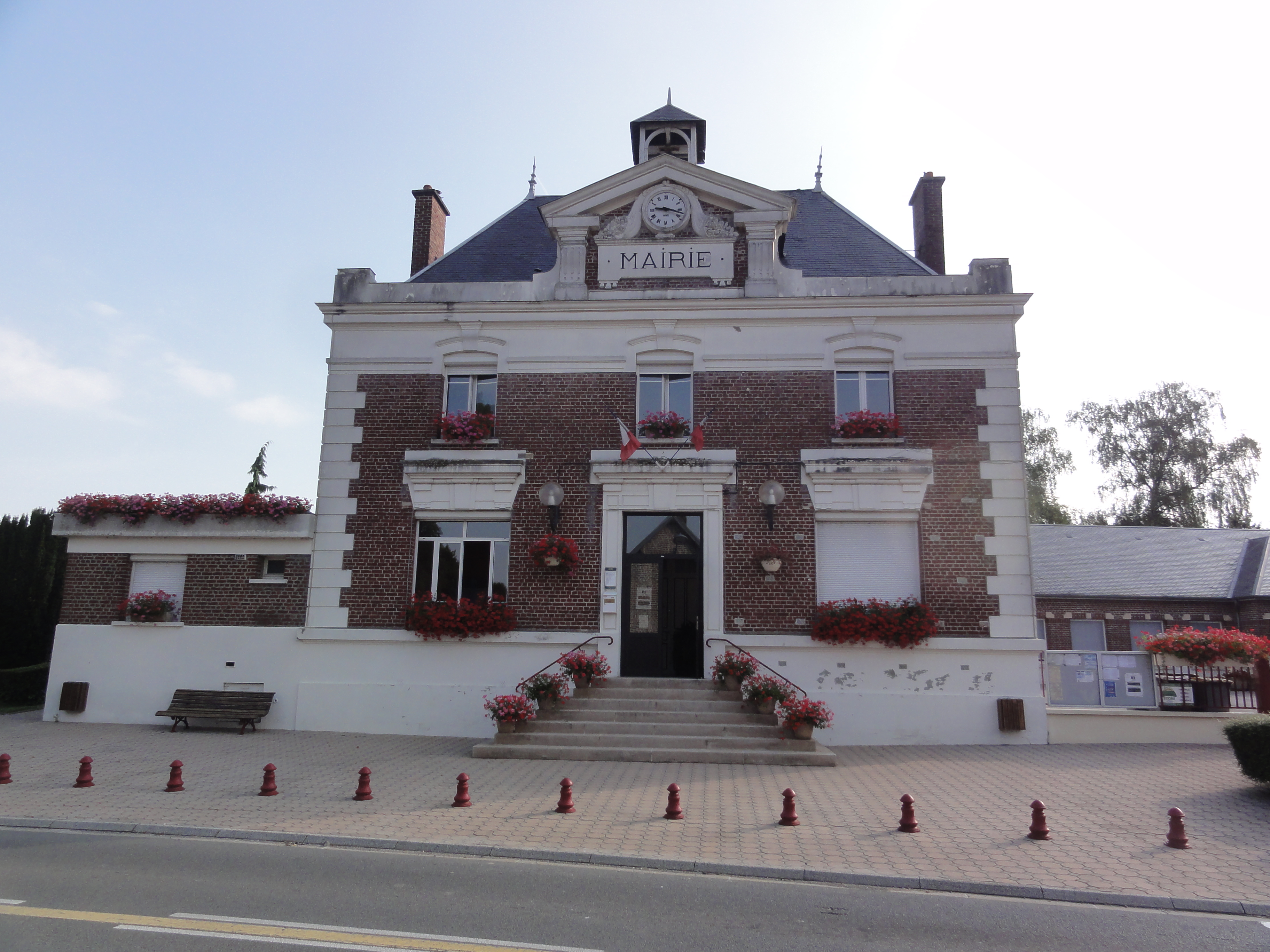 Fayet (Aisne) mairie